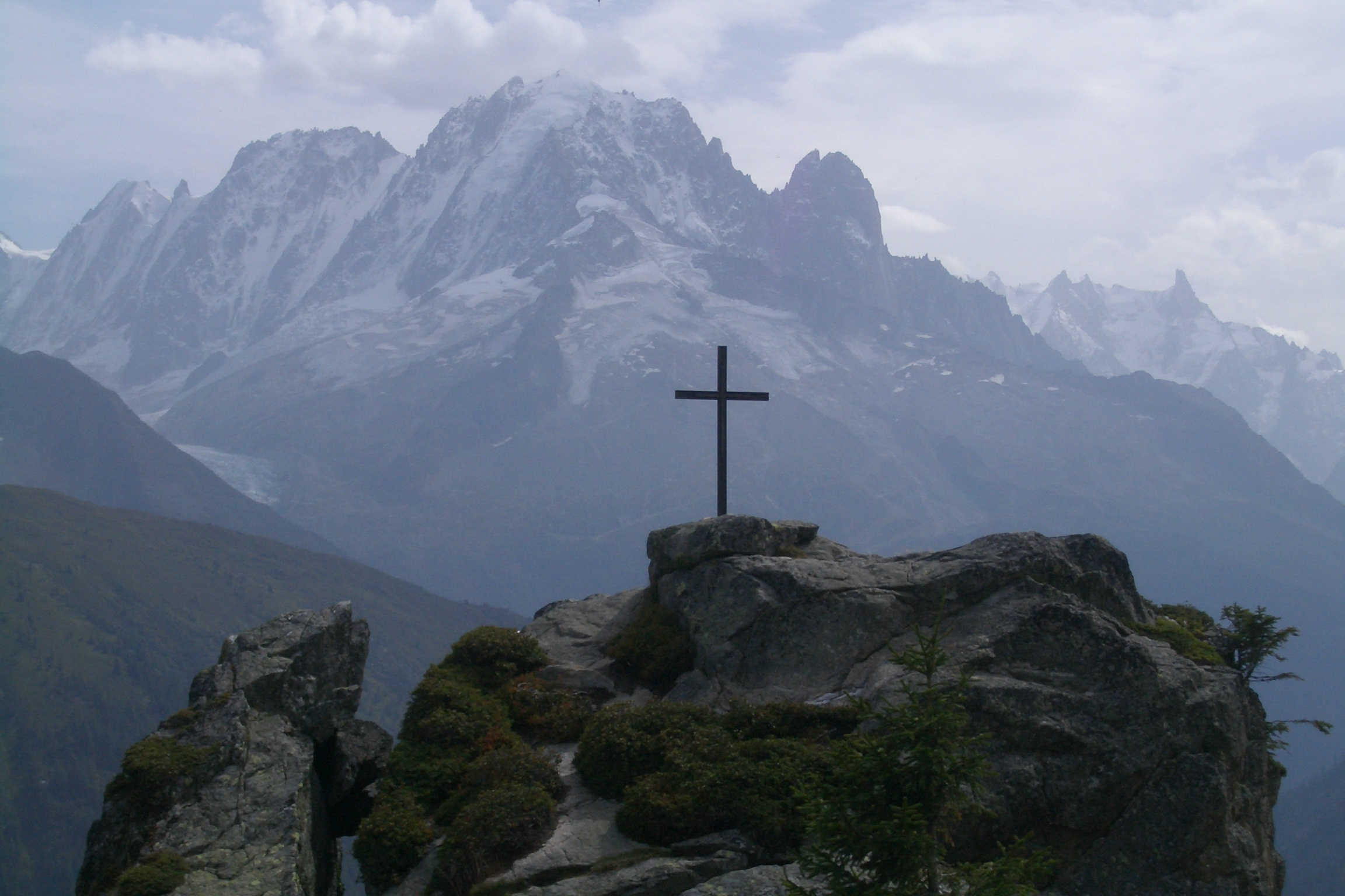 Au premier plan silhouette de la Croix de Loriaz se détachant sur le massif de l'Aiguille Verte (commune de Vallorcine). A droite l'ombre des Drus.